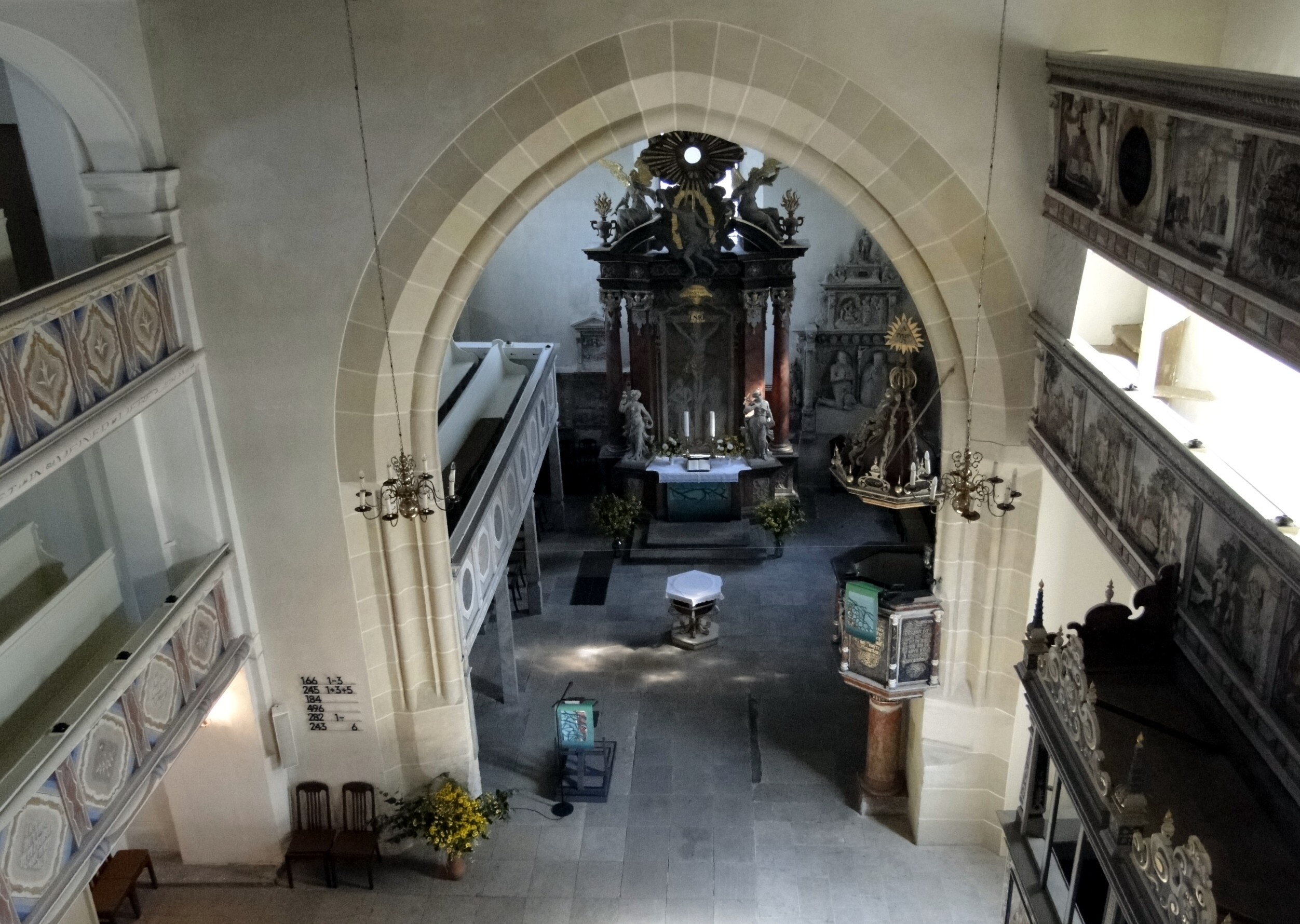 Blick zum Altar der Kirche Leubnitz-Neuostra in Dresden